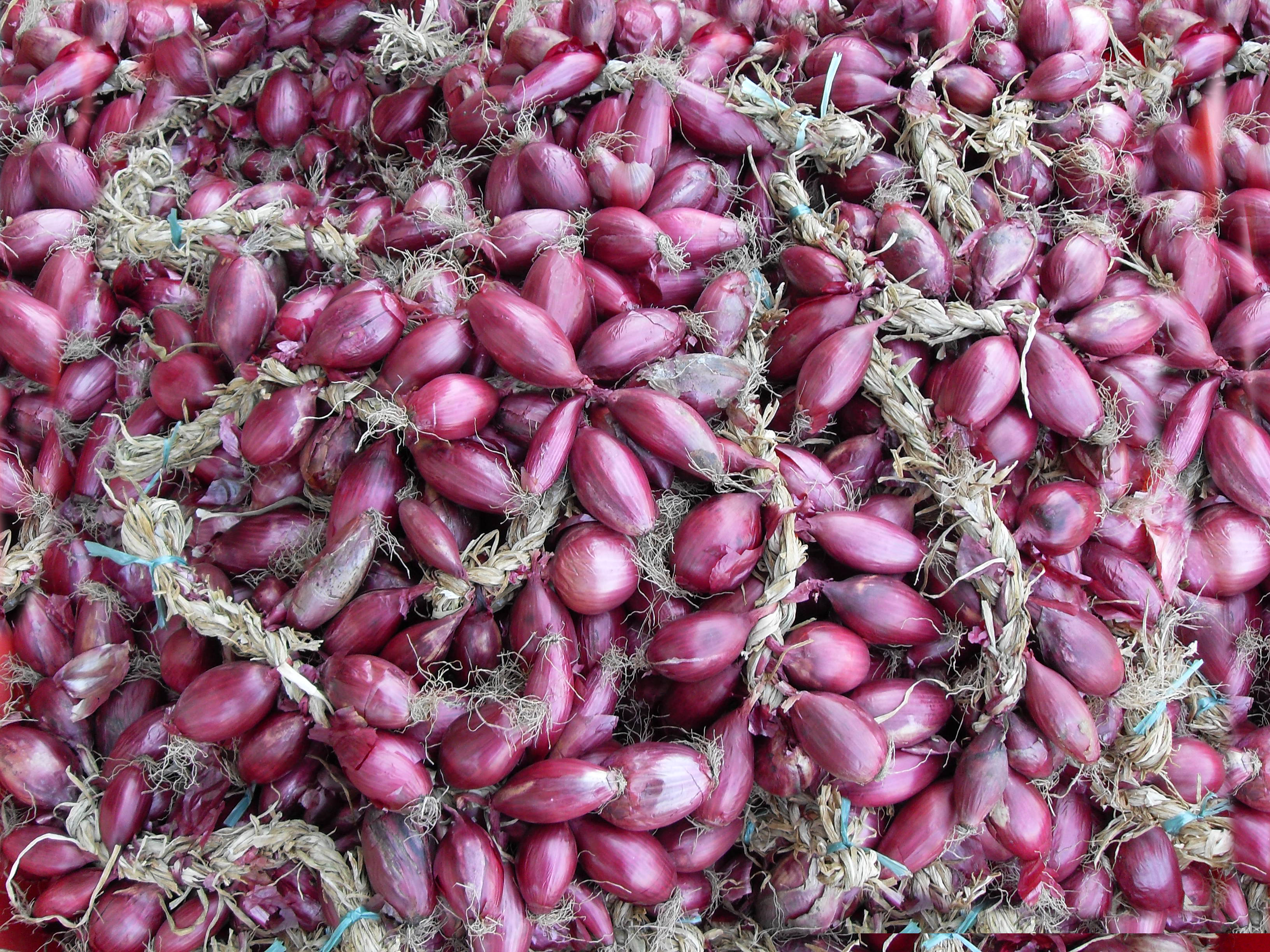 Io sottoscritto Luigi Salvatore Vadacchino, utente di Wikipedia sotto il nome di Lodewijk Vadacchino, cedo l'immagine SDC11097.jpg a Wikimedia Italia, sotto licenza CC-BY-SA, con Campora_San_Giovanni_-_Cipolla_Rossa_Grossa_Camporese_Collo_di_Cigno.jpg L'Immagine fotografica raffigurantela tradizionale cipolla rossa di Tropea, nella variante "Grossa Camporese alla collo di Cigno . Porgo come sempre i miei distintissimi saluti, con l'augurio che possiate venirmi a far visita. Vostro come sempre--Lodewijk Vadacchino (msg) 10:28, 1 ago 2009 (CEST)